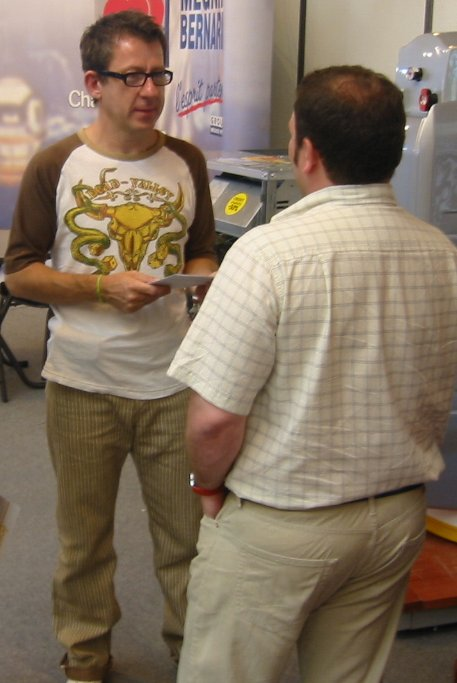 Jamy Gourmaud - Salon des Energies Nouvelles de Besancon